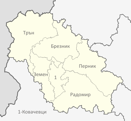 Картата е създадена от Любомир Таушанов